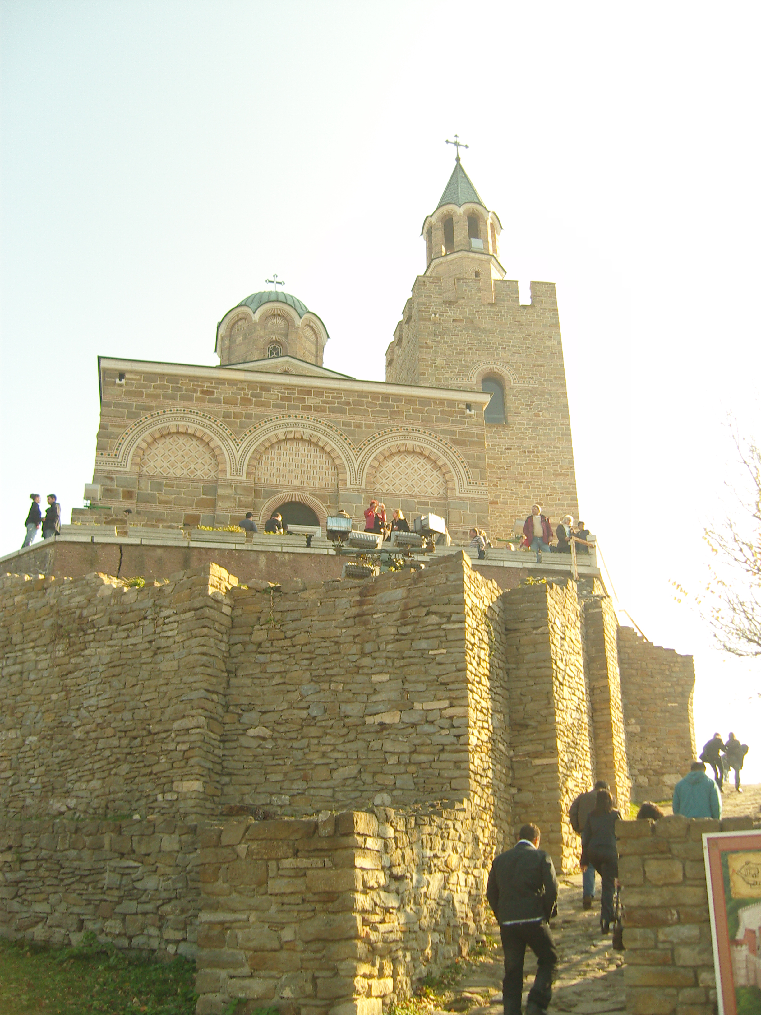 Крепостта Царевец, намираща се непосредствено над центъра на град Велико Търново.